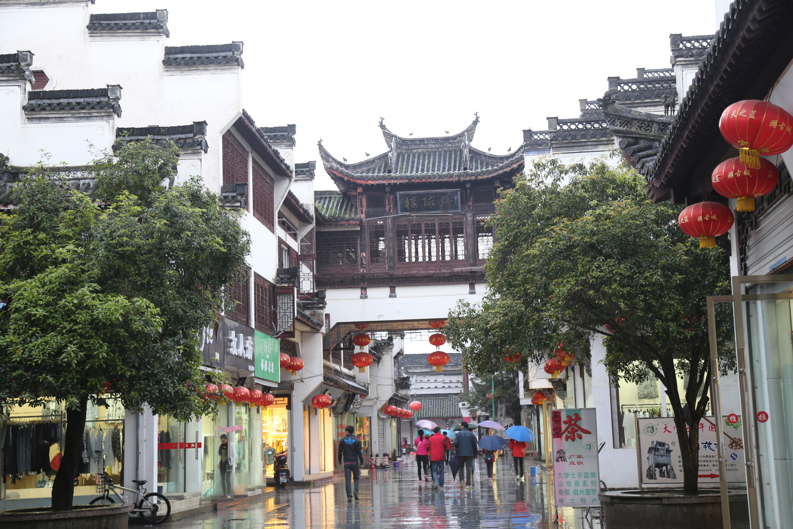 徽州古城风光